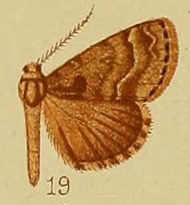 Tephrialia trigonospila